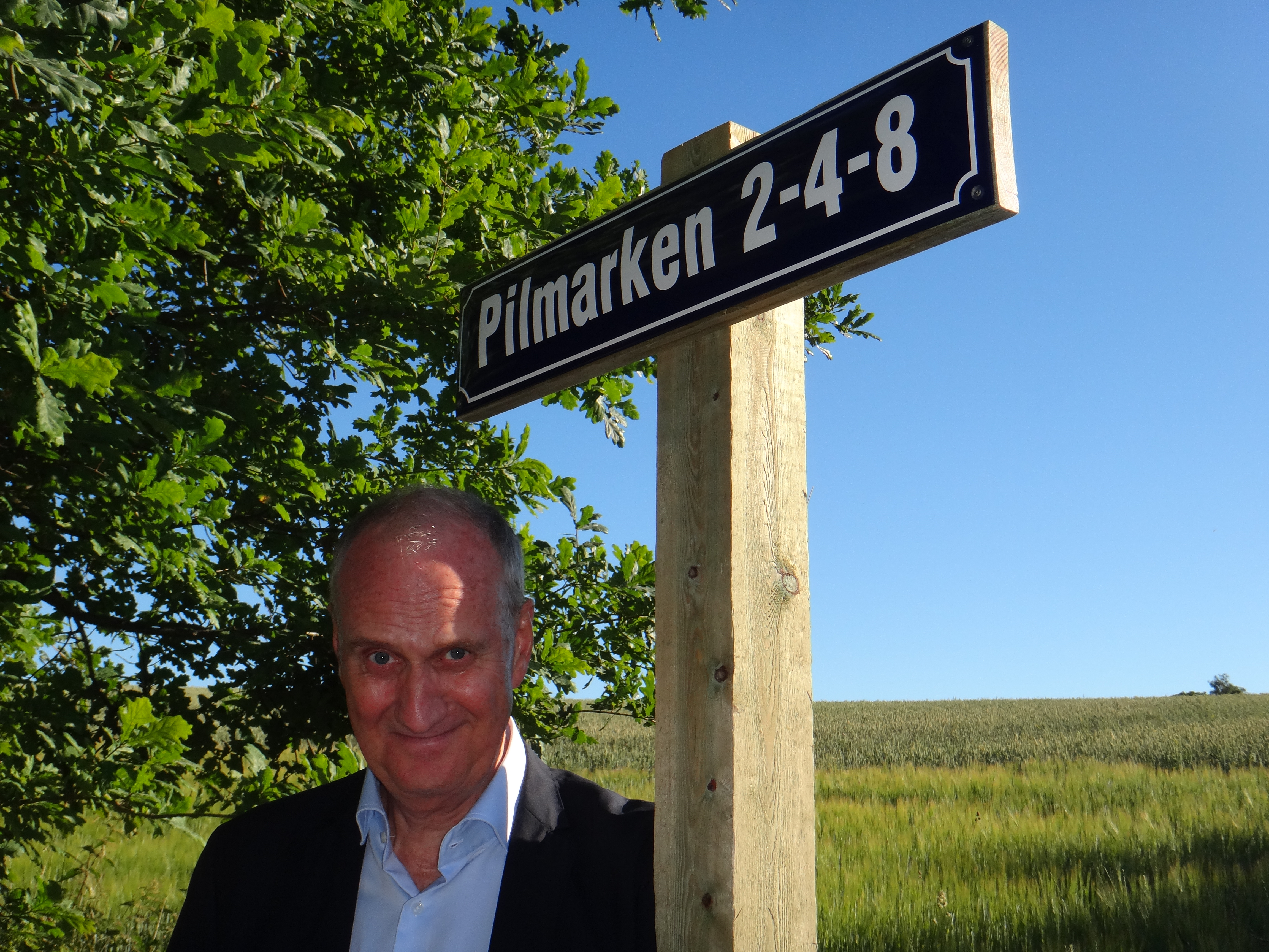 Søren Pilmark ved den vej, han som æreskunstner i Østermarie fik opkaldt efter sig.